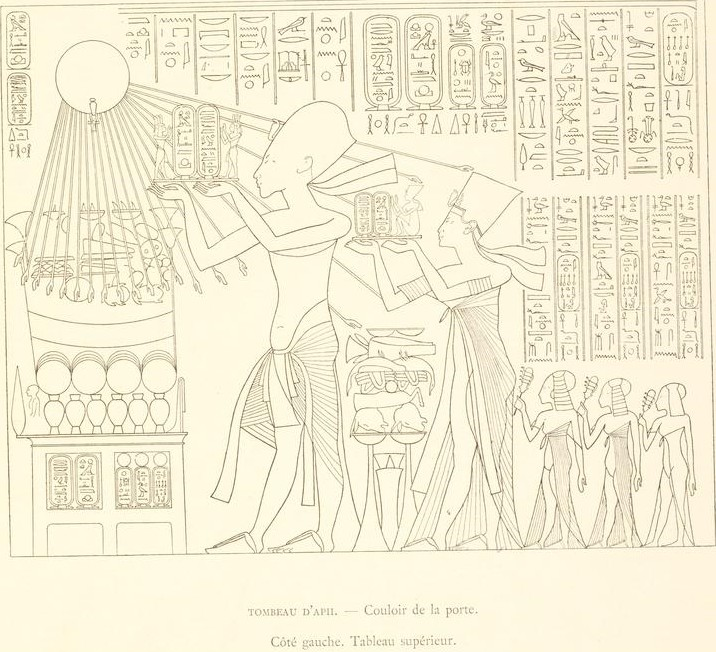 Grab des Apii (IPI)in Amarna – Gang von der Tür. Linke Seite. Oberes Bild. Ipi und seine Familie bringen Speiseopfer, die von der Sonnenscheibe Aton gesegnet werden. Aton wurde durch die Sonnenscheibe verkörpert, dessen Strahlen in Hände münden. Beschreibung in franz.: Tombeau D’APII – Couloir de la porte. Coté gauche. Tableau supérieur.